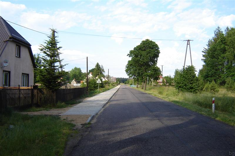 Warnino, gmina Tychowo